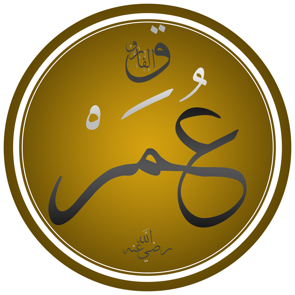 كتابة اسم سيدنا عمر بن الخطاب رضي الله عنه